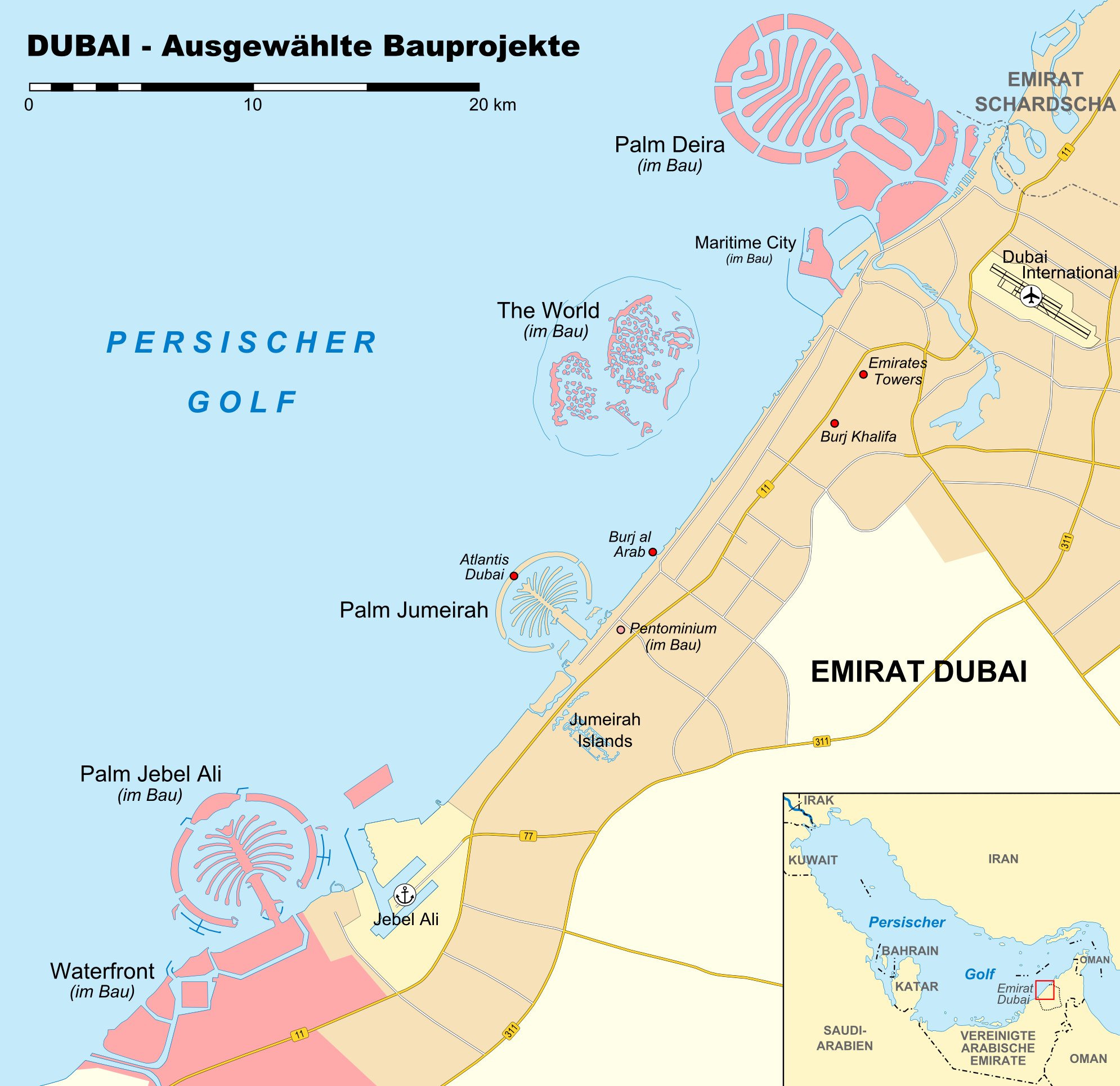 Karte der Bauprojekte in Dubai (Palm Jebel Ali, Palm Jumeirah, Palm Deira, The World, The Universe, Waterfront u. a.), Stand: Januar 2010